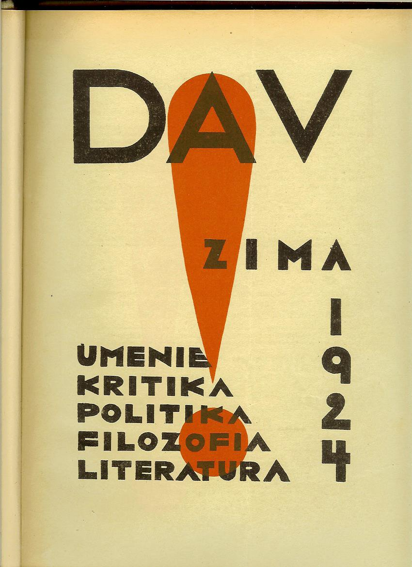 DAV, revue 1924